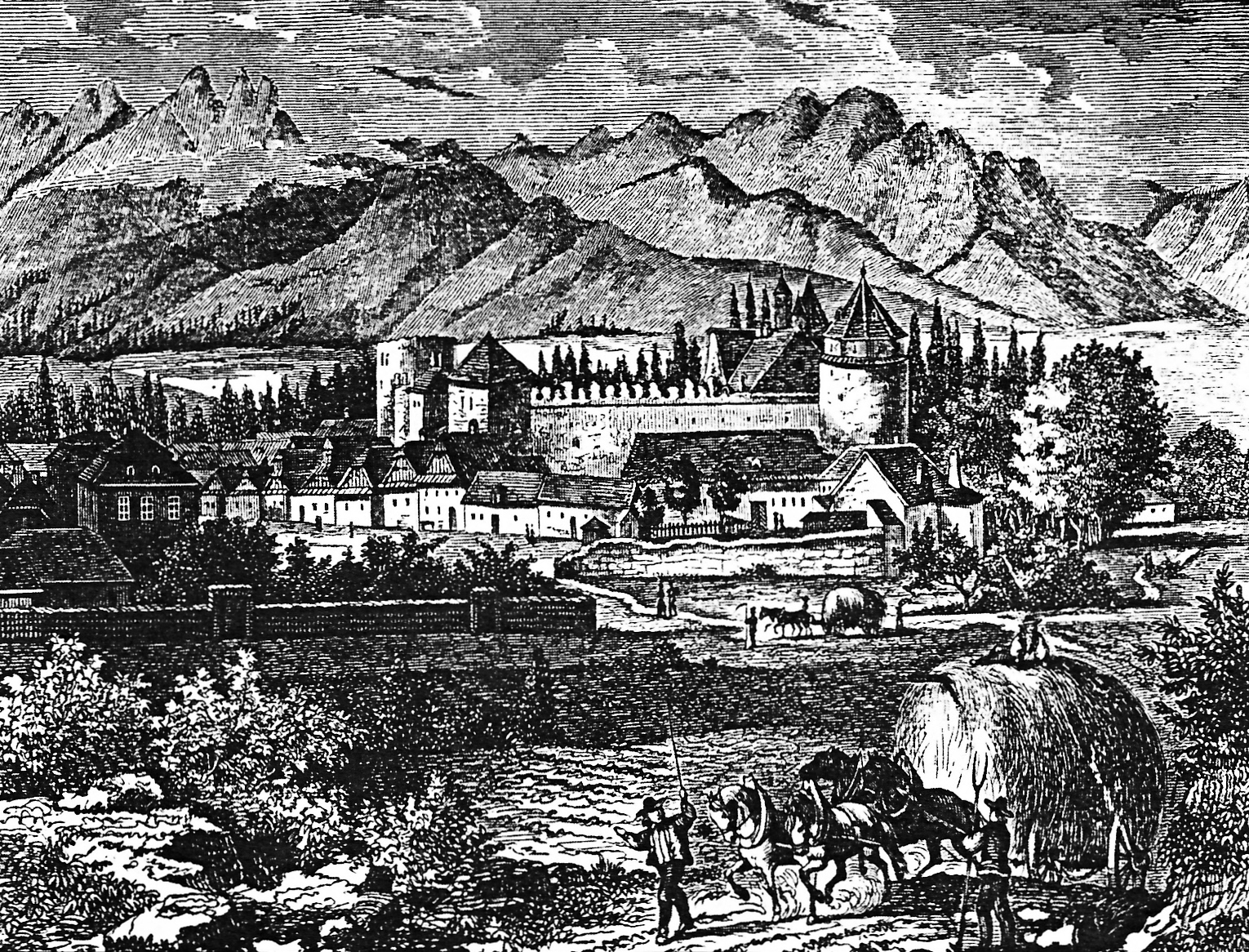 Kežmarský hrad, dobová kresba . Hrad bol postavený v 2. polovici 15. storočia, najdlhšie v ňom sídlili štyri generácie rodiny Thököly